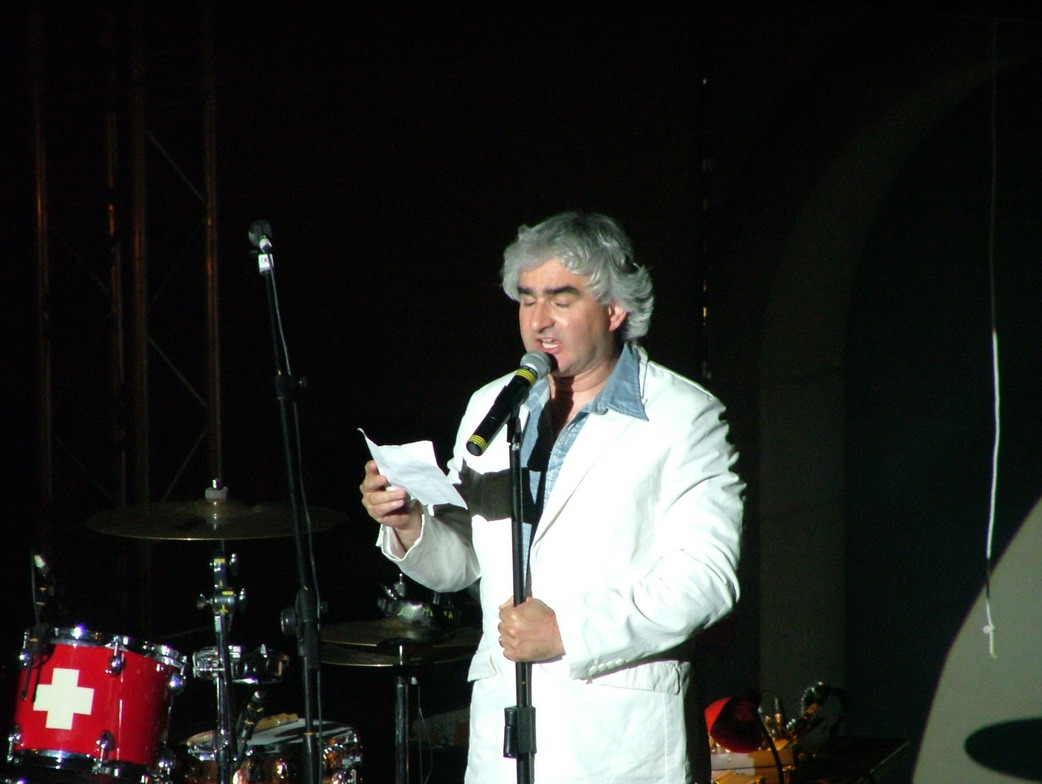 Luca Mangoni durante uno spettacolo